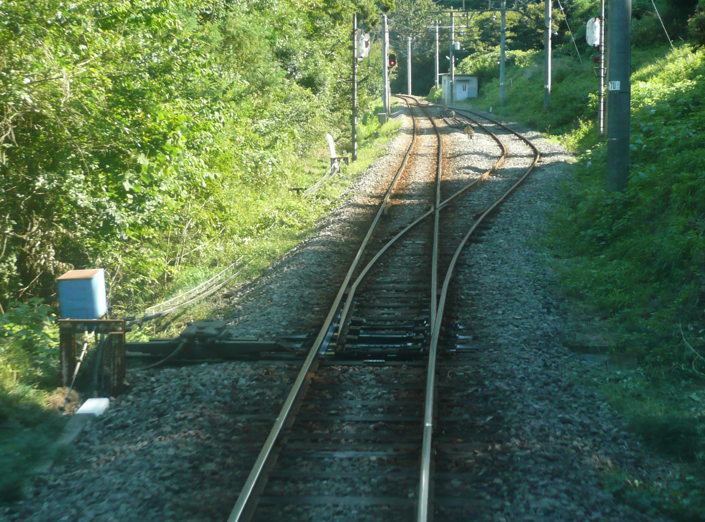 上信電鉄上信線赤津信号所（高崎方から撮影）